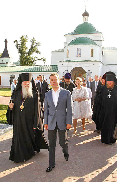 Дмитрий и Светлана Медведевы посетили Спасо-Преображенский мужской монастырь. С архиепископом Владимирским и Суздальским Евлогием.